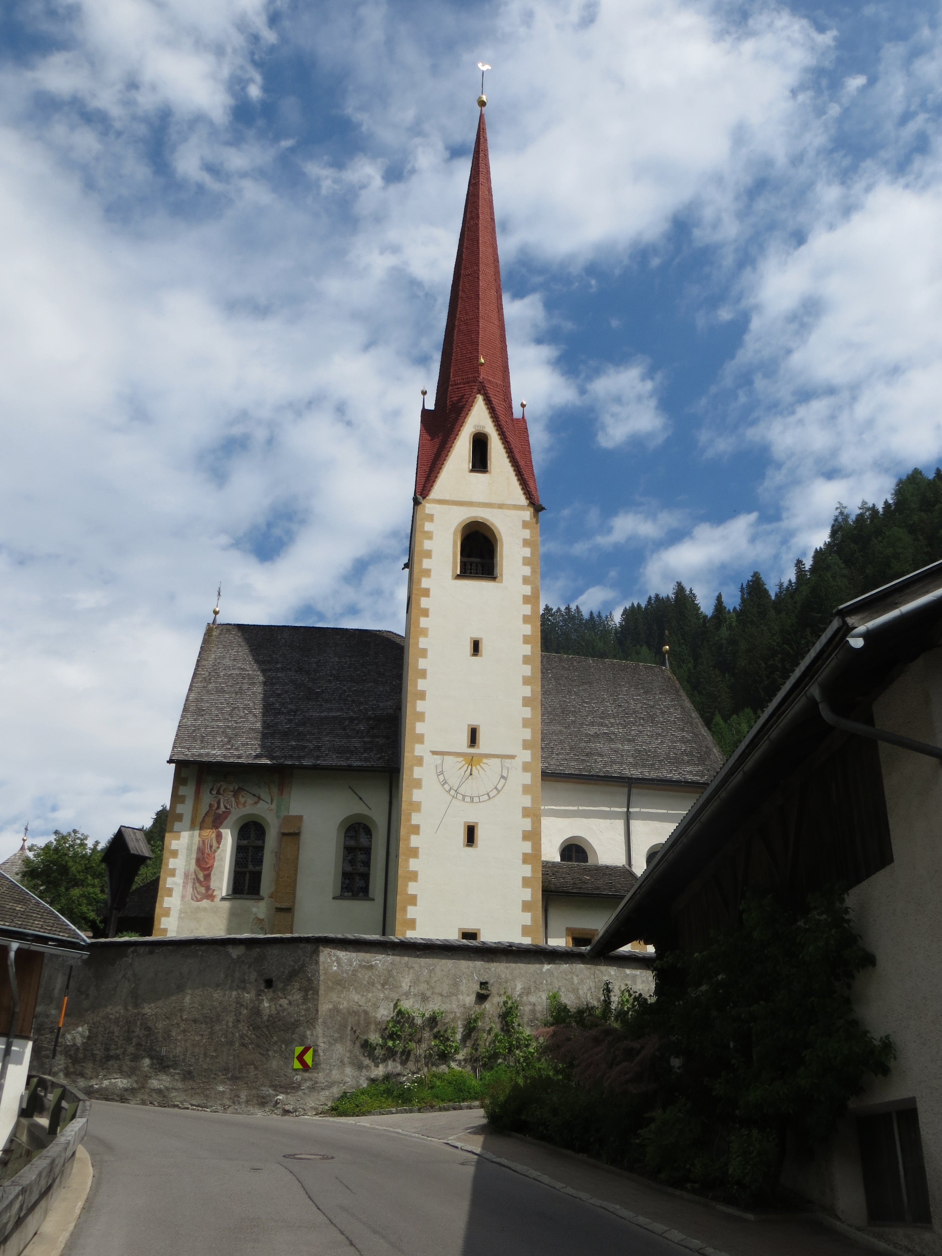 Kath. Filialkirche St. Ulrich